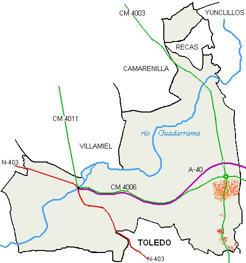 Croquis del término municipal de Bargas (Toledo) año 2007